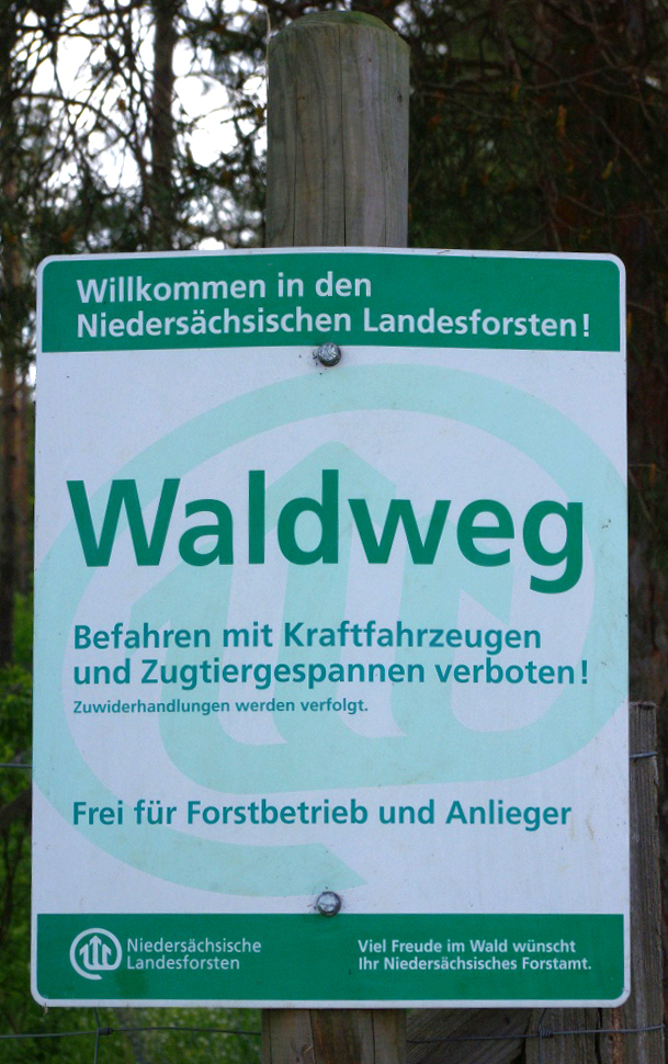 Naturschutzgebiet Appelhorn (NSG BR 141) bei Bredelem, Waldweg-Schild (Niedersächsische Landesforsten)